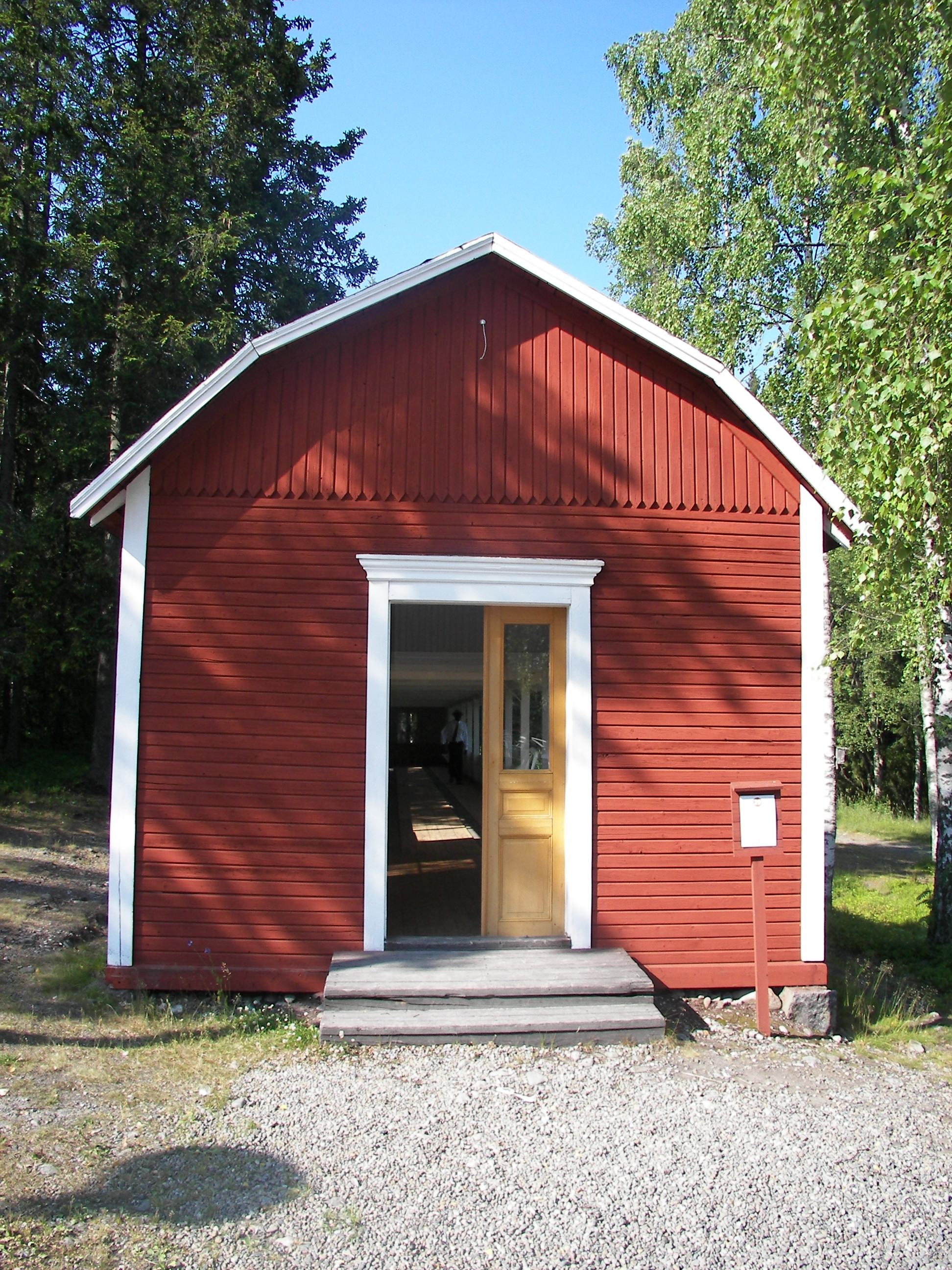 Kägelbanan på Murberget